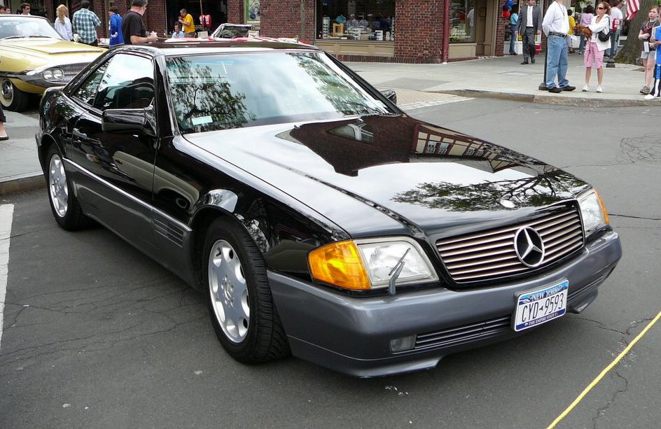 4代目SLクラス（ハードトップ装着）.